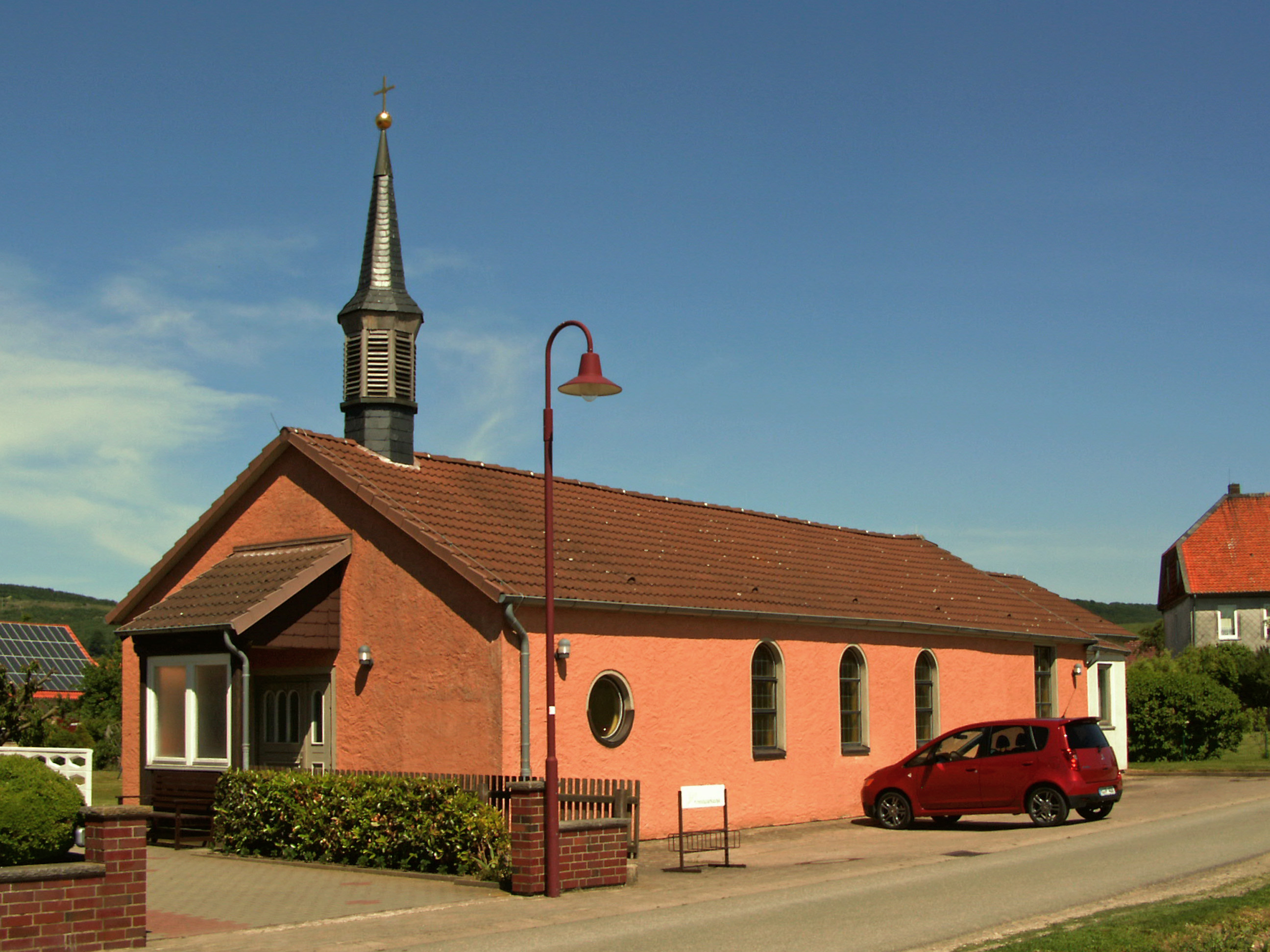 Katholische Kirche St. Joseph in Eitzum, Ortsteil von Despetal